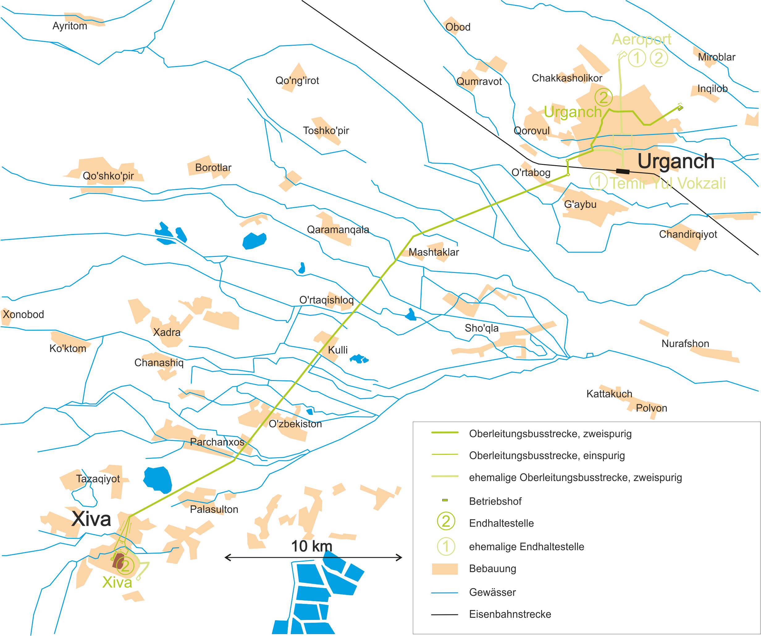 Oberleitungsbus Urganch 2013